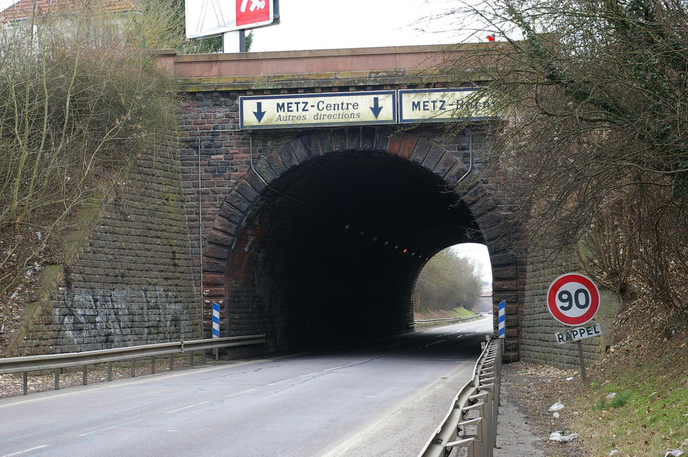 alter Tunnel von Vallières-Borny der Eisenbahnstrecke Metz Anzelingen